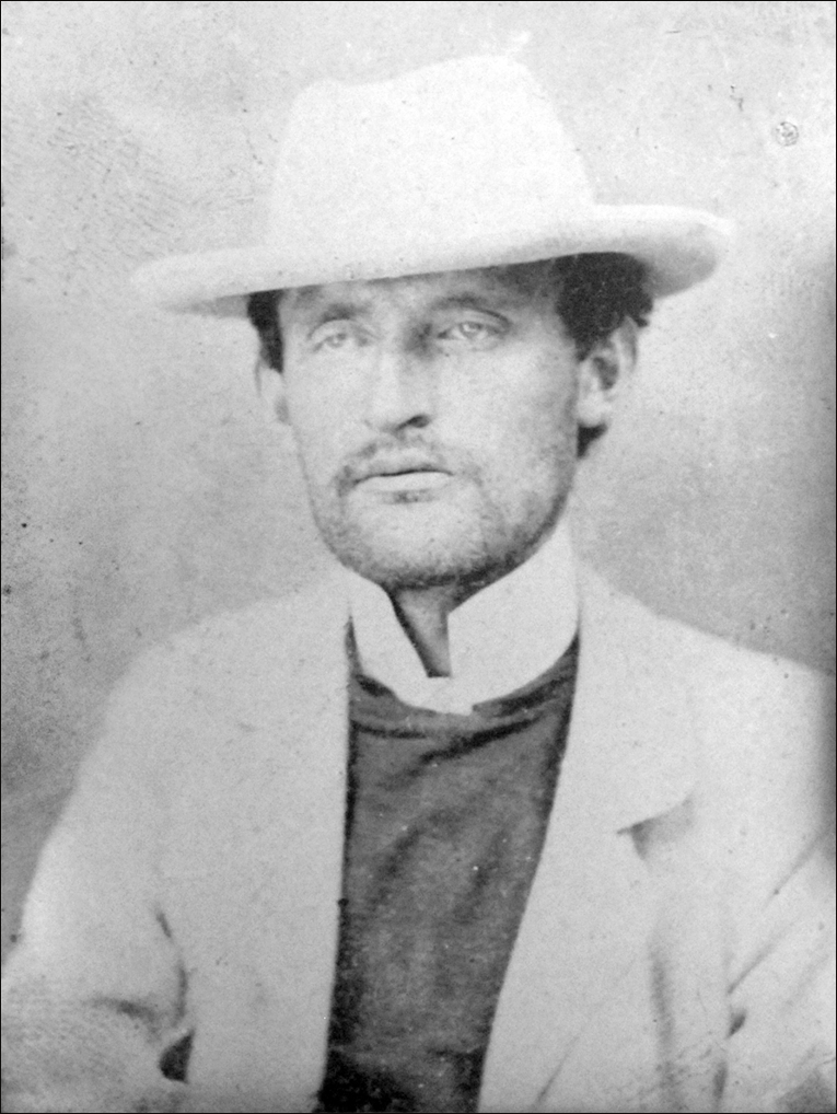 Portrait photographique d'Edvard Munch 1902. Munch Museum photo archive. Photo exposée rephotographiée dans le musée